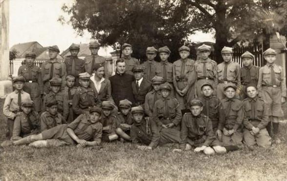 Беларуская (тарашкевіца): Атрад скаўтаў з Клецку на зборах. 13.06.1934